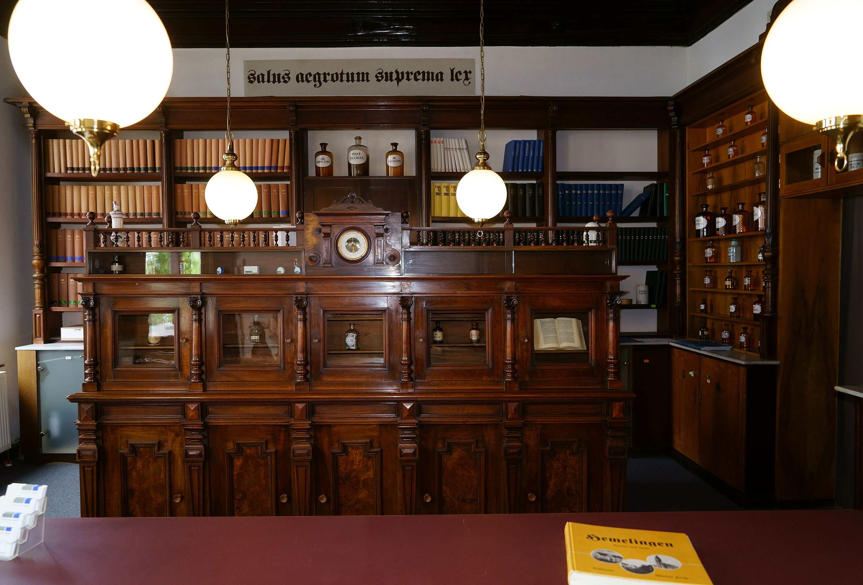 Alte Apotheke Hemelingen in Bremen, Hemelinger Bahnhofstraße 15Das abgebildete Objekt ist ein geschütztes Kulturdenkmal in der Freien Hansestadt Bremen, mit der Nr. 0485 beim Landesamt für Denkmalpflege registriert.